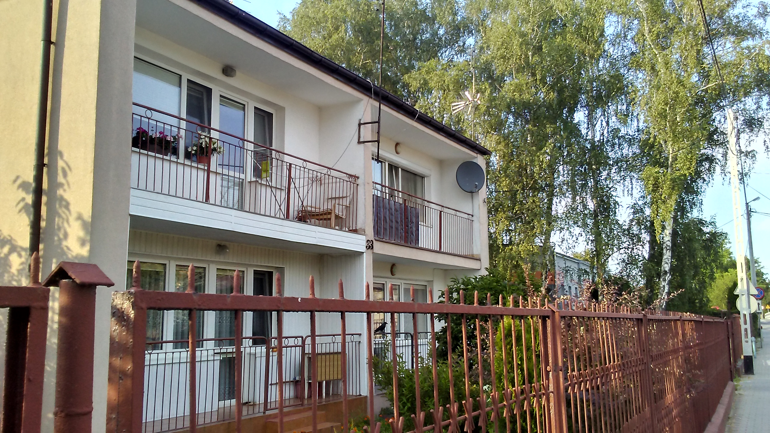 Blok mieszkalny na Białobrzegach w Tomaszowie Mazowieckim